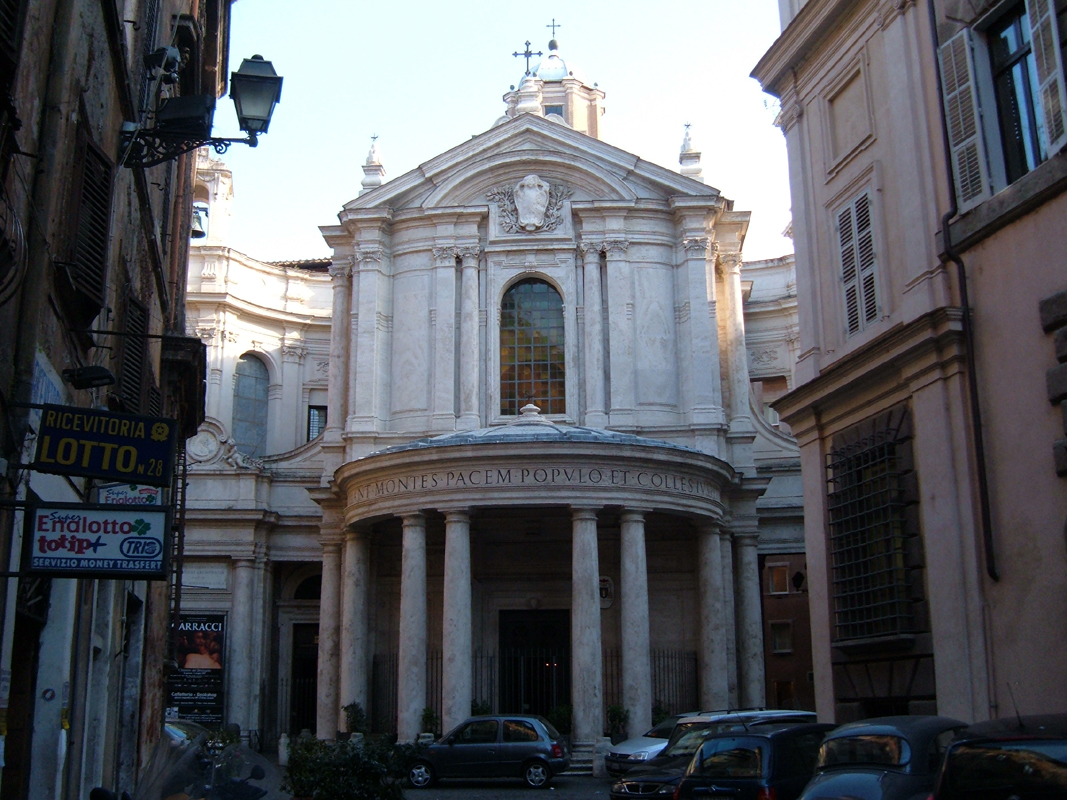 Chiesa di S. Maria della Pce a Roma, nel rione Ponte